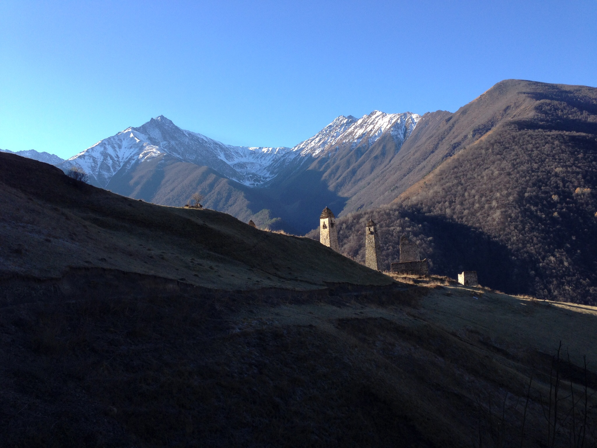 Башни в Джейрахском районе This image is related to the protected area of Russia number 0600002